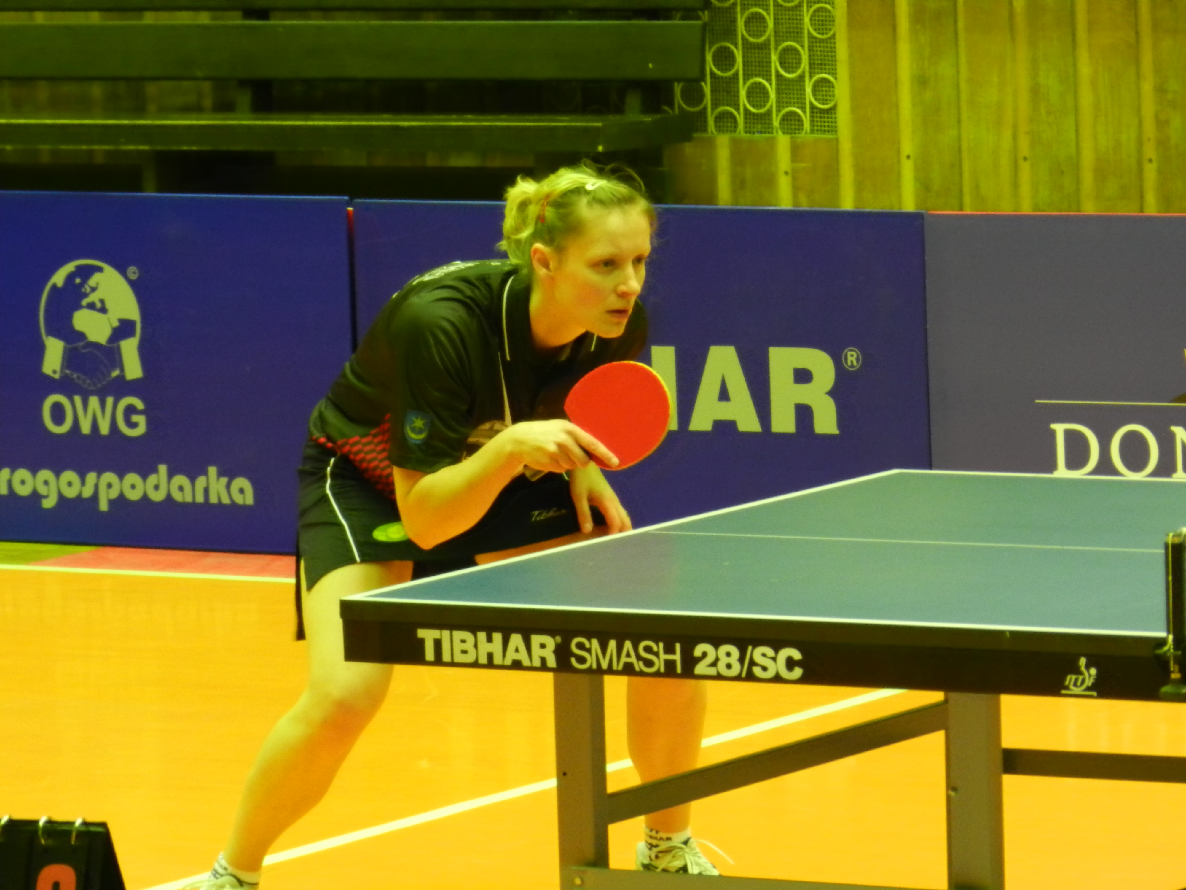 Kinga Stefańska (zawodniczka KTS Tarnobrzeg) podczas meczu przeciwko KU AZS AJD Częstochowa w dniu 13 listopada 2012 roku.